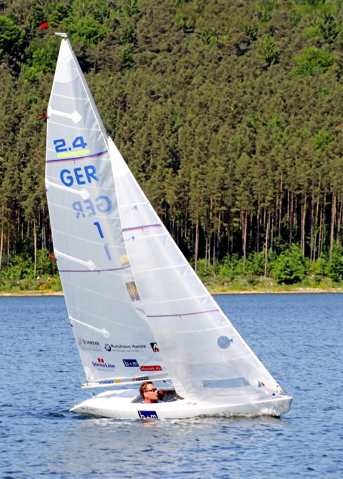 Heiko Kröger bei der Deutschen Meisterschaft der Behindertensegler auf dem Großen Brombachsee